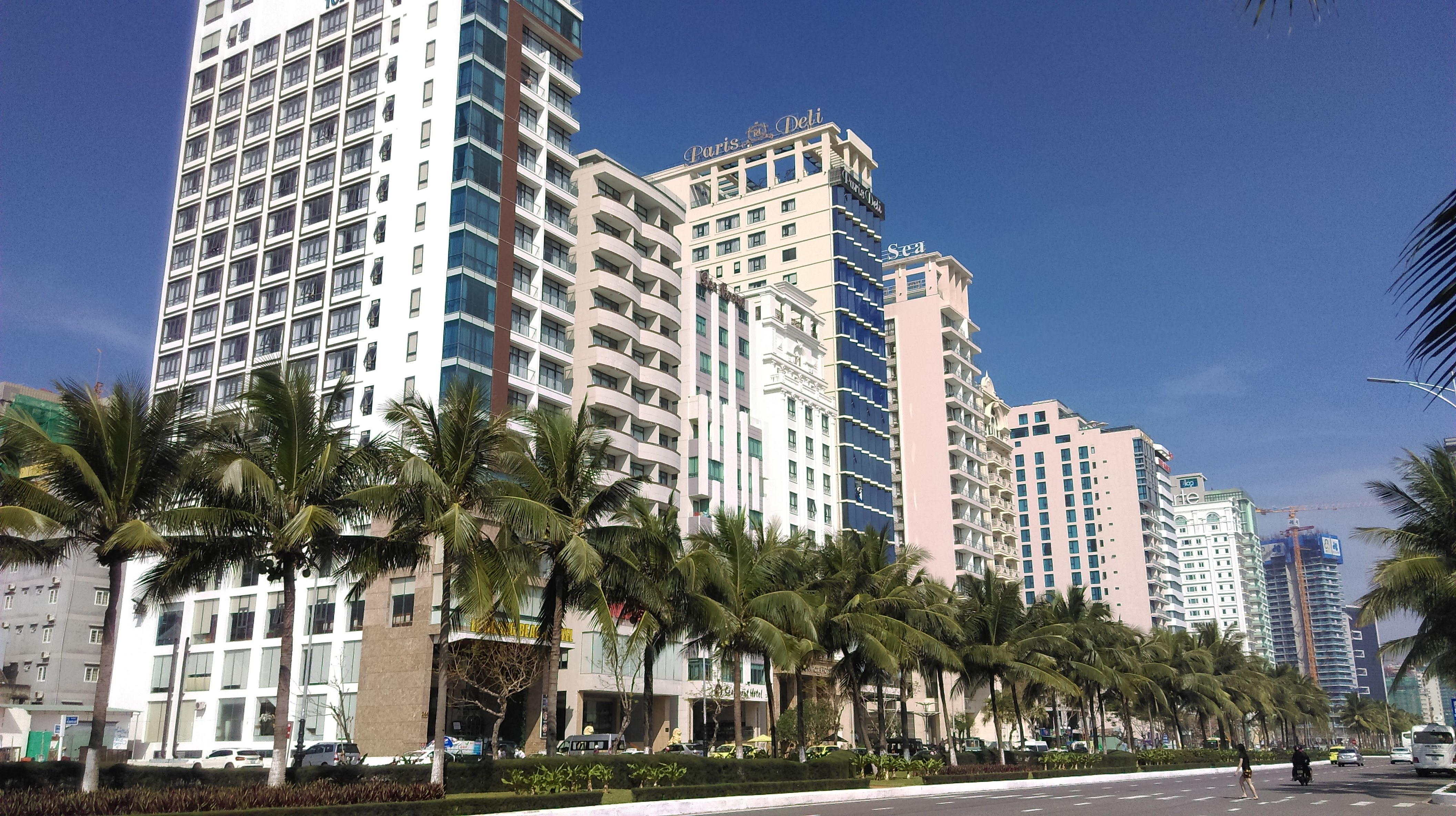 Khách sạn tại Sơn Trà